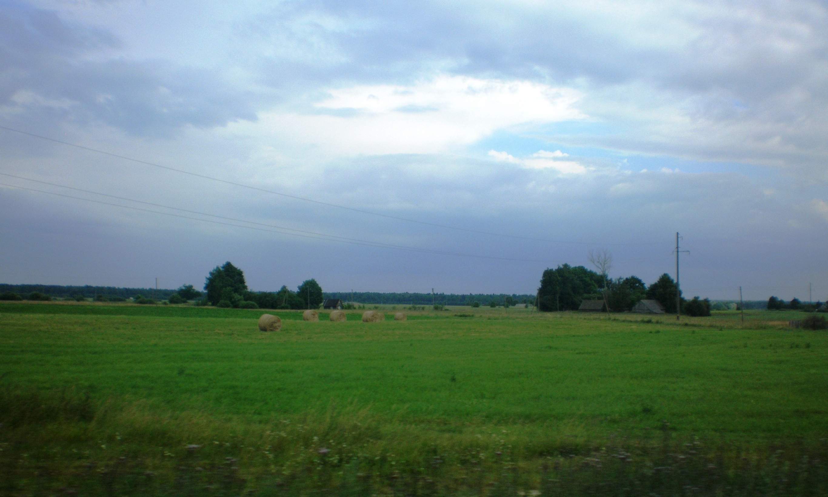 Čiurliai, Prienų raj.